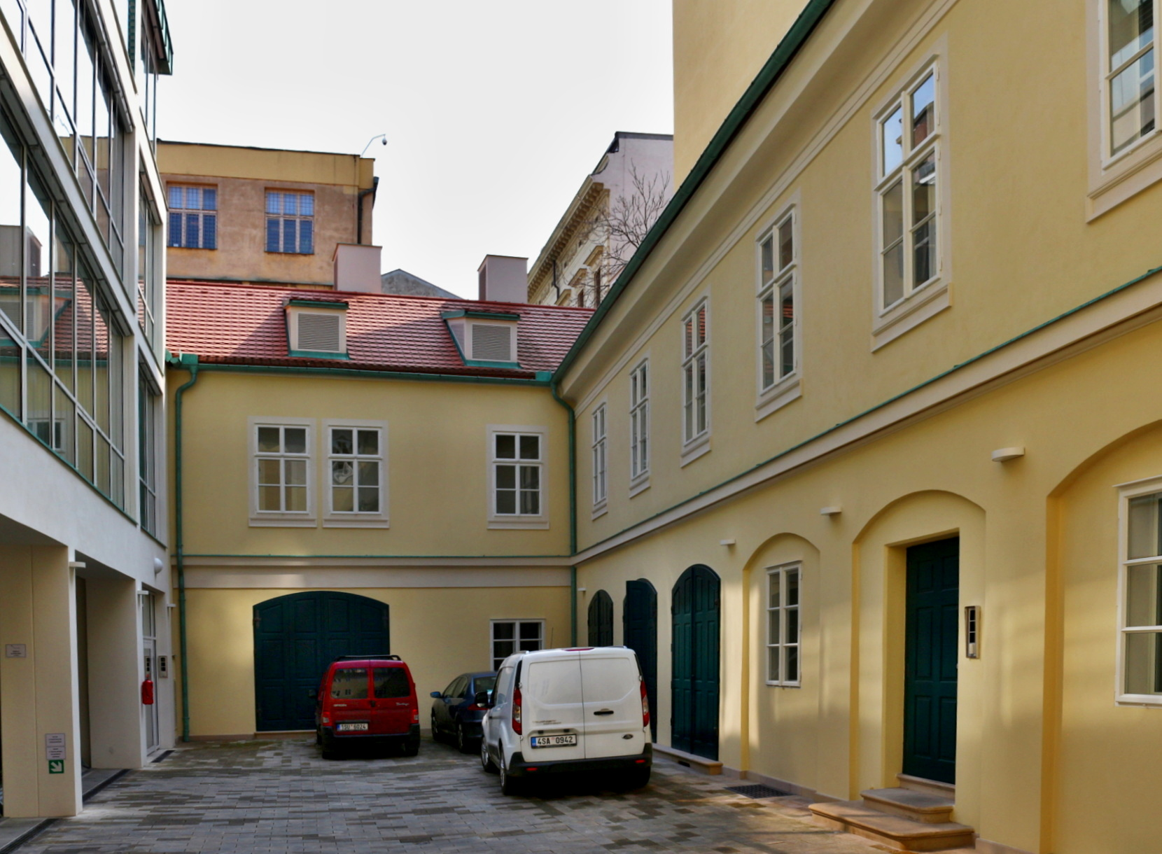 Harrachovský palác v Praze